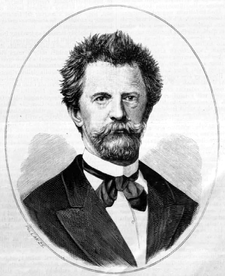 Greguss Ágost (1825–1882) író, esztéta, kritikus, egyetemi tanár, akadémikus portréja. Pollák Zsigmond metszete